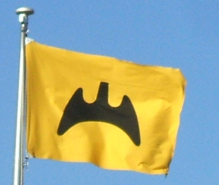 投稿者が福山市の施設を撮影した写真を編集して作成